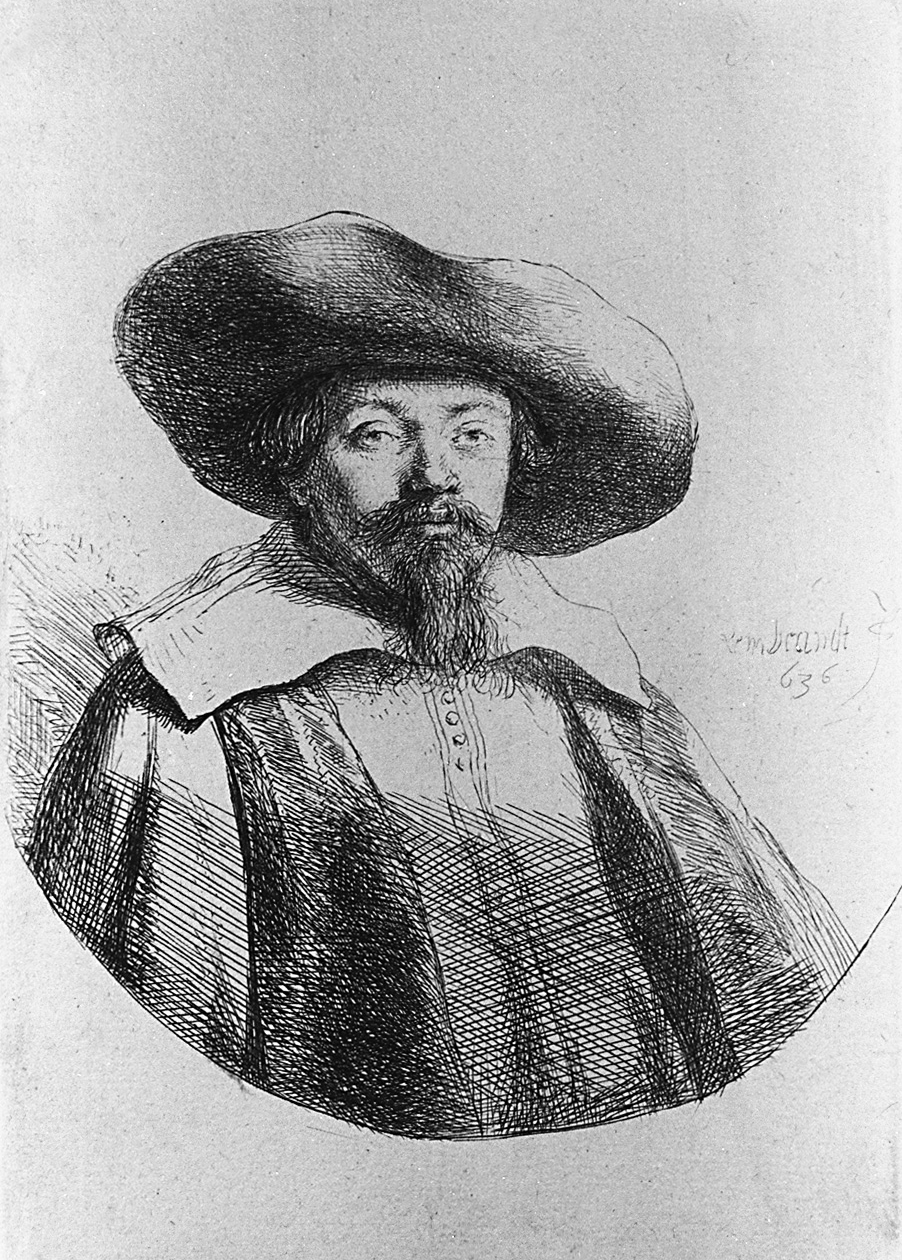 Portrait of Samuel Menasseh ben Israel (1604-1657)